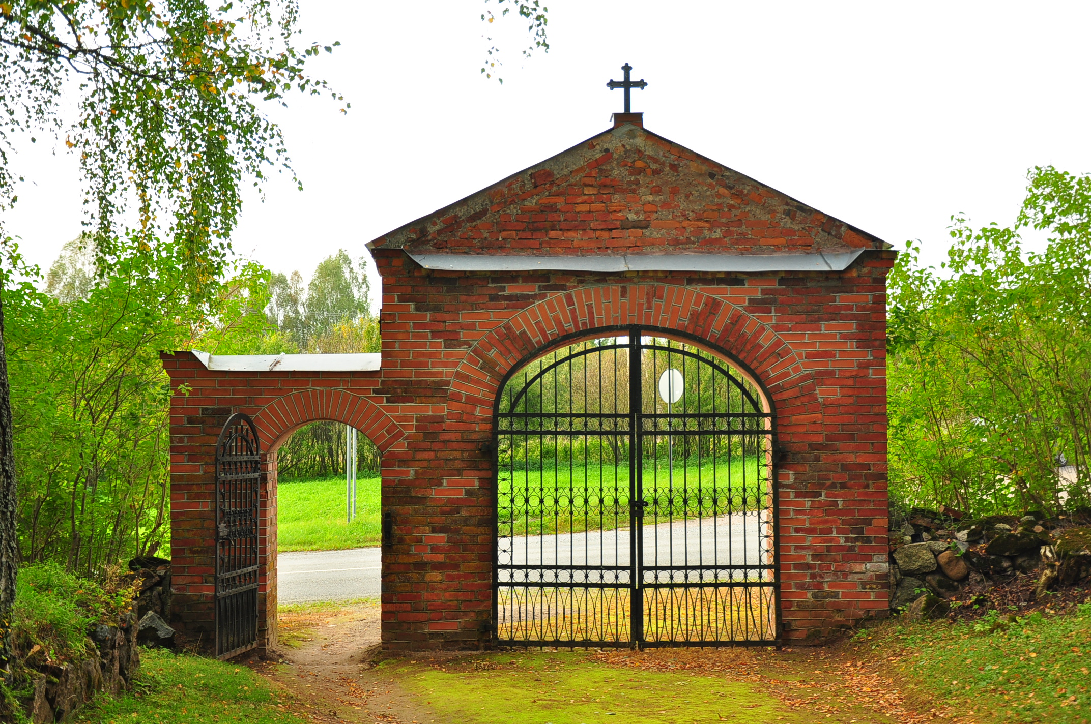 Nõo kalmistu